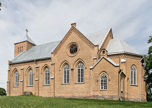 Veprių bažnyčios pietinis fasadas